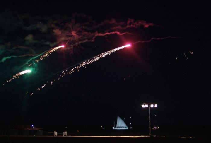 Llegada de los piratas a la costa de Premià de Mar.